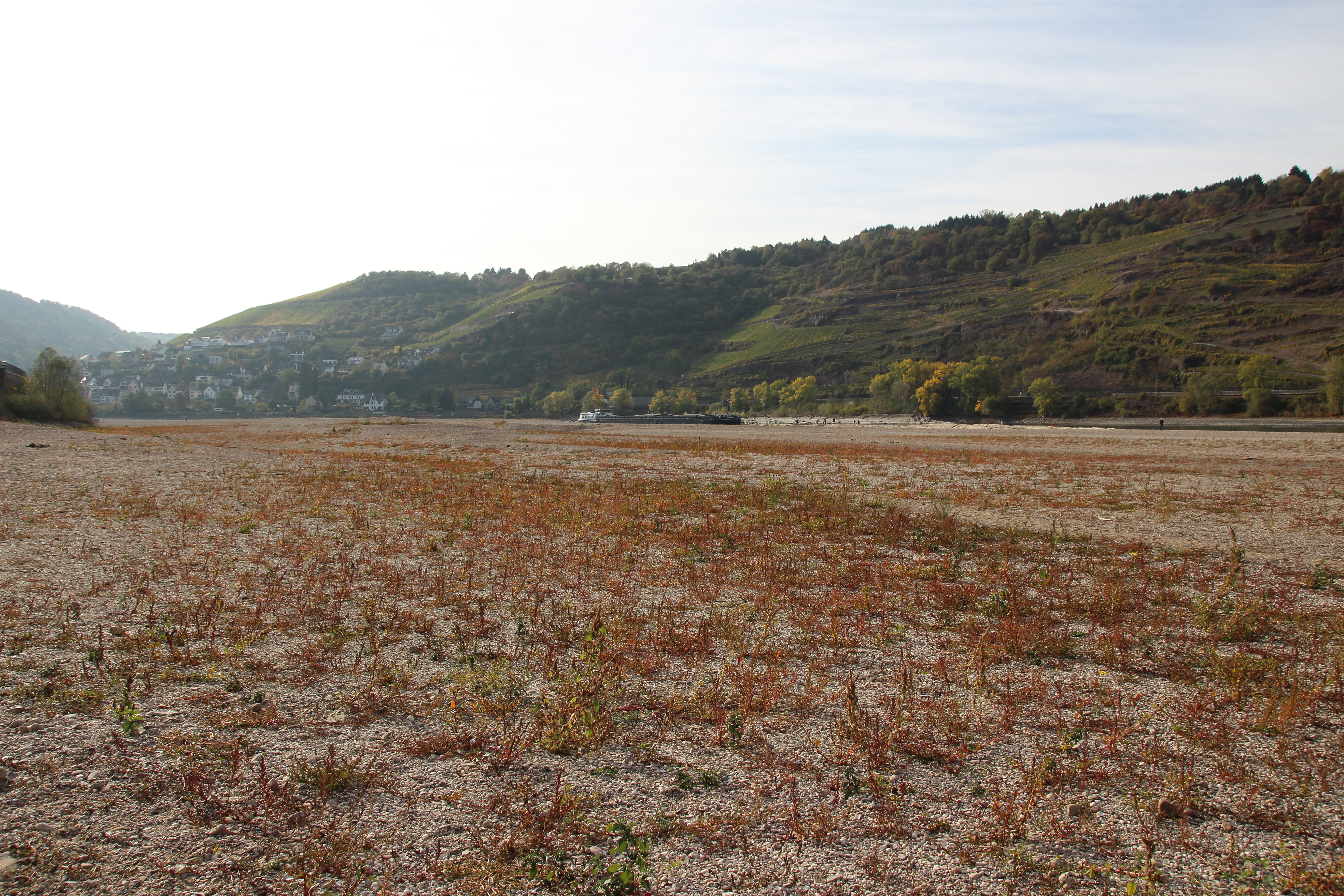 Jungferngrund bei Niedrigwasser im Oktober 2018, Rheinkilometer 551. Im Hintergrund Oberwesel.